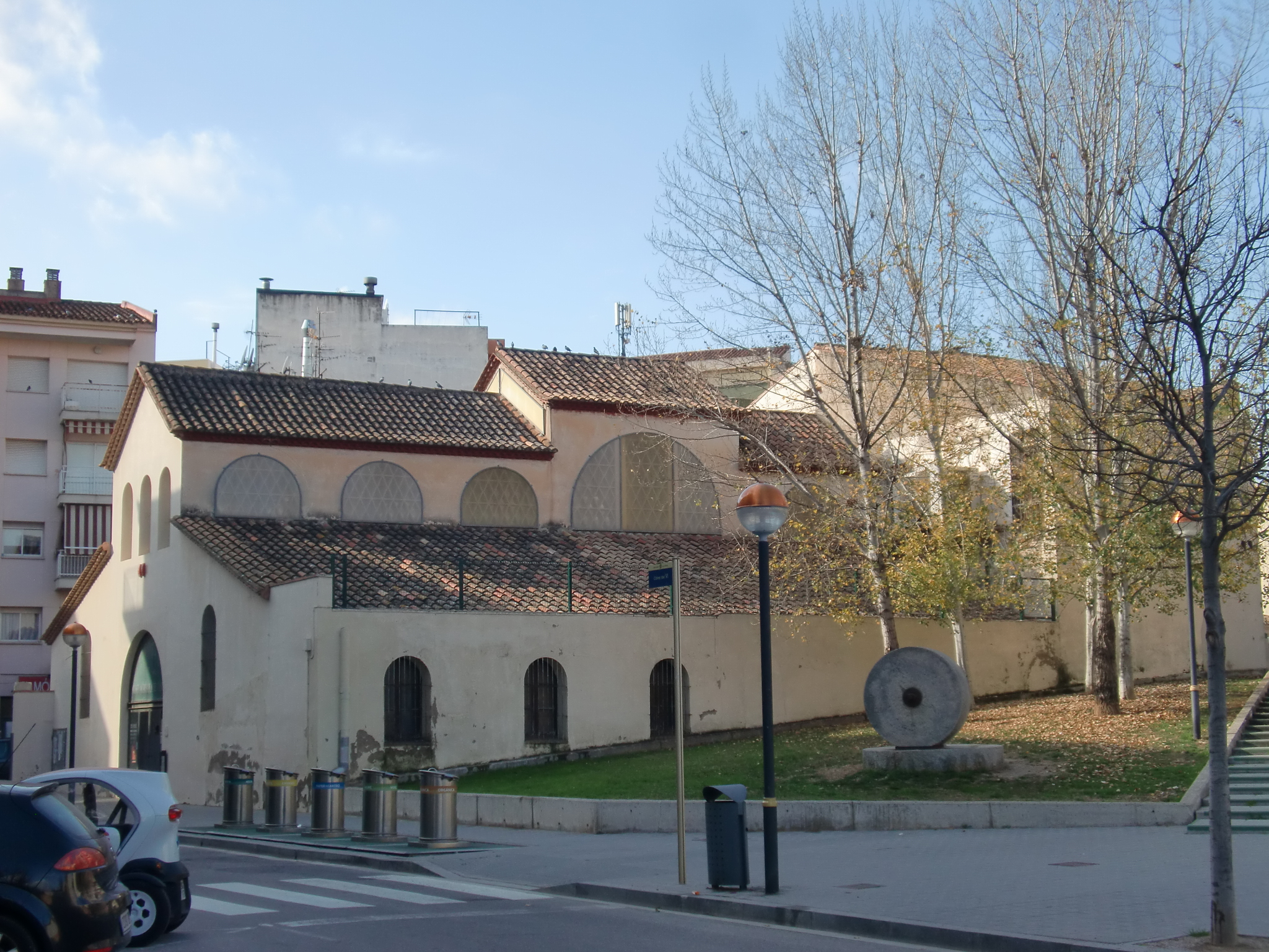 Antic Celler del Sindicat Agrícola (Cambrils)